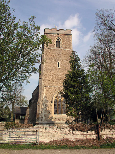 Little Eversden, St Helen